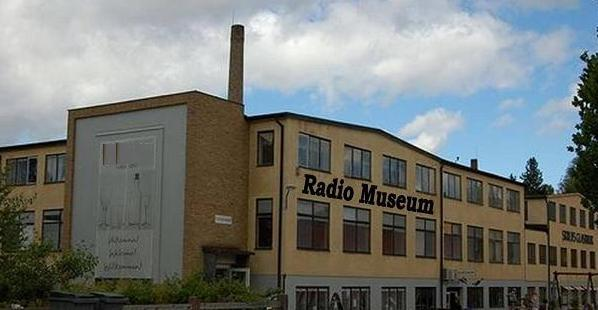 Denna byggnad rymmer Rolf Bergendorffs Radiomuseum som visar utvalda delar av Rolfs enorma radiosamling.Däri man kan finna det mesta av elektriska apparater som förekommit i folkhemmen under 1900 talet. Även temautställningar med specialinriktning inför varje säsong...